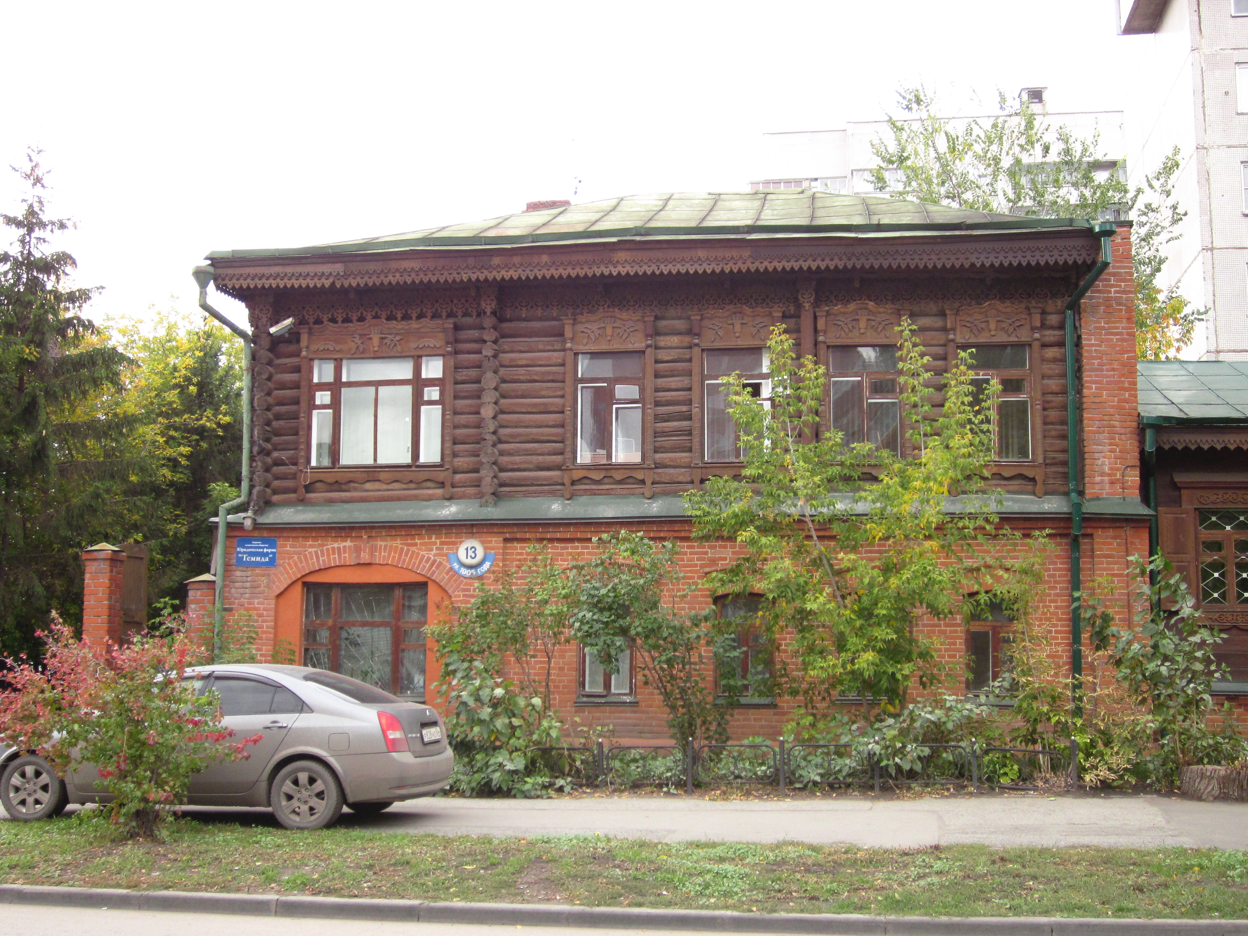 Дом, в котором с 1927 по 1929 г. жил выдающийся партийный и государственный деятель Косыгин Алексей Николаевич